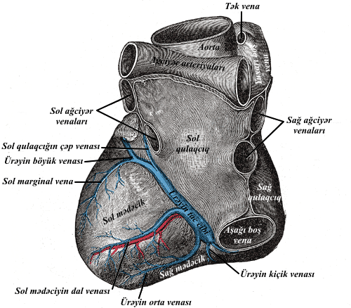 Ürek venaları